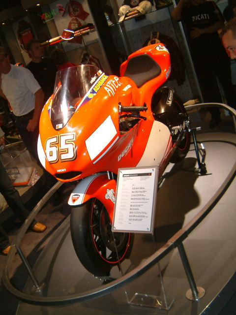 Desmosedici Frontansicht -Intermot 2004